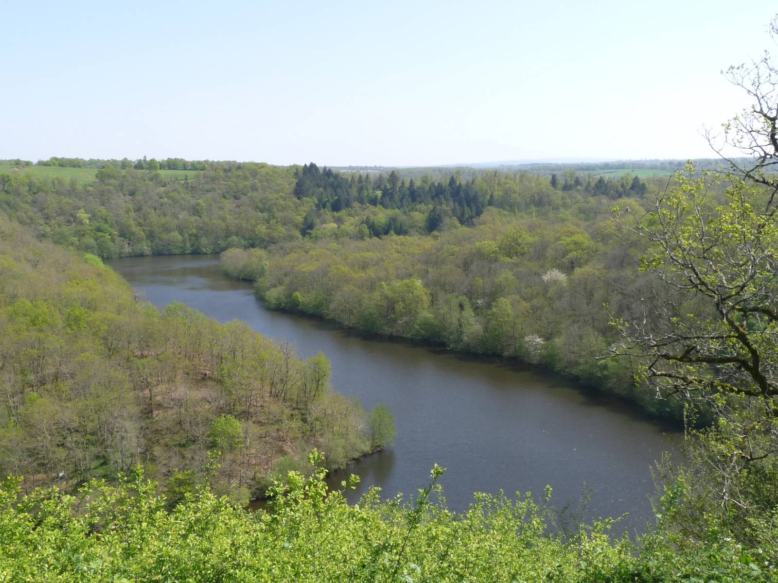 L'Issoire et son lac de barrage, vue de Belle Vue, St-Germain-de-Confolens, Charente, France